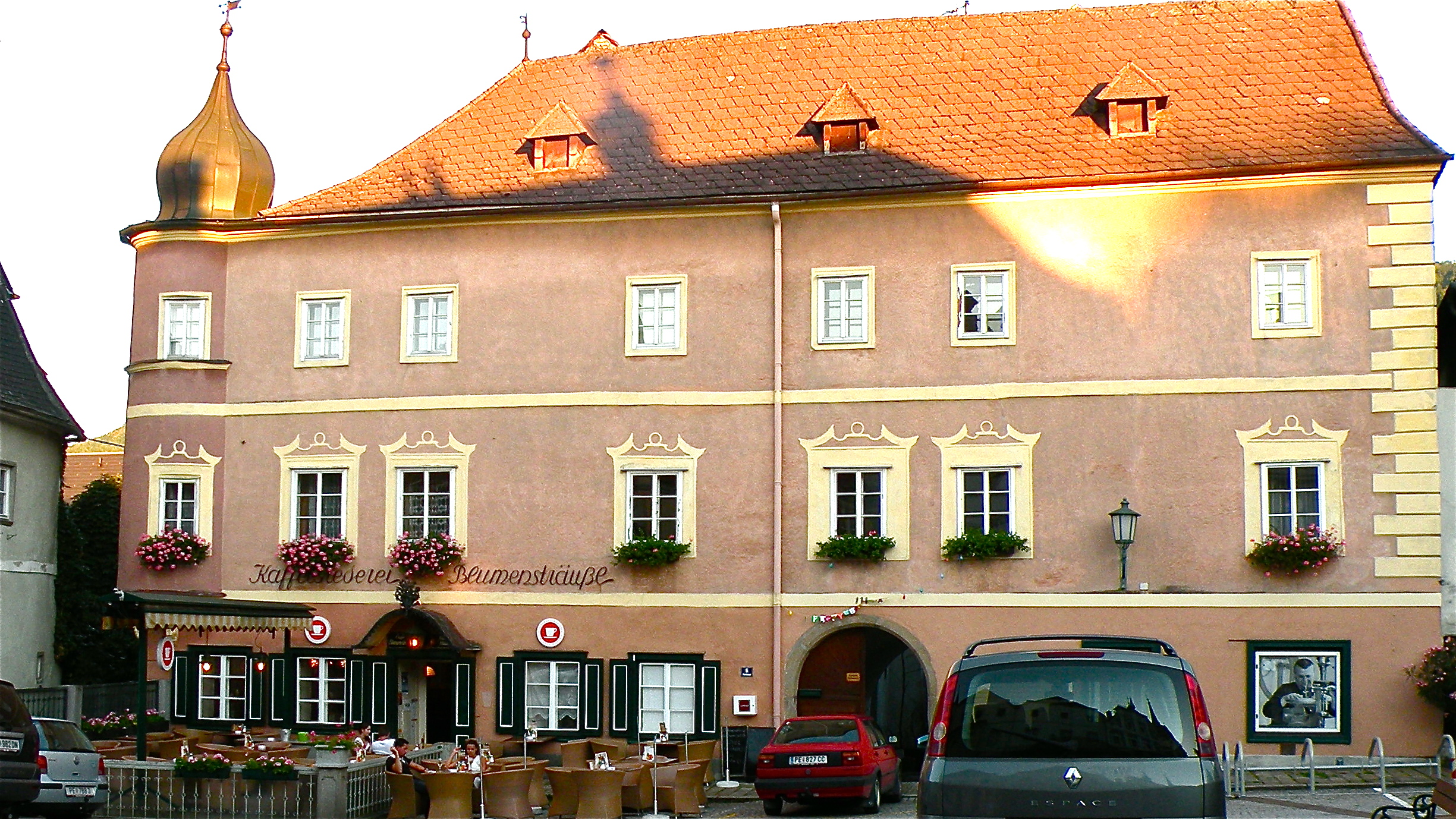 Kaffeesiederei Blumensträußl in der Stadt Grein im Bezirk Perg in Oberösterreich